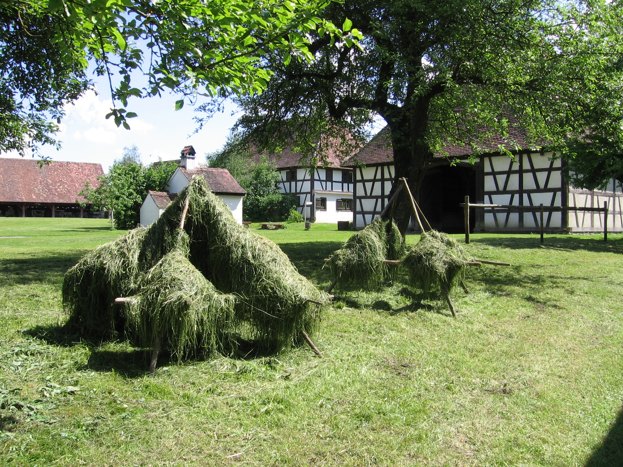 Typisches Heumanderl aus dem Freilichtmuseum Kürnbach bei Biberach